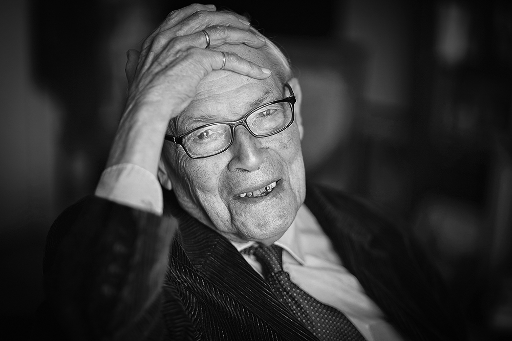 Le pasteur Michel Leplay en 2017.